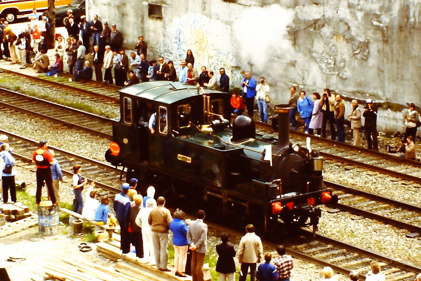 Dampflokomotive Dunrobin auf der SteamExpo 86 in Vancouver